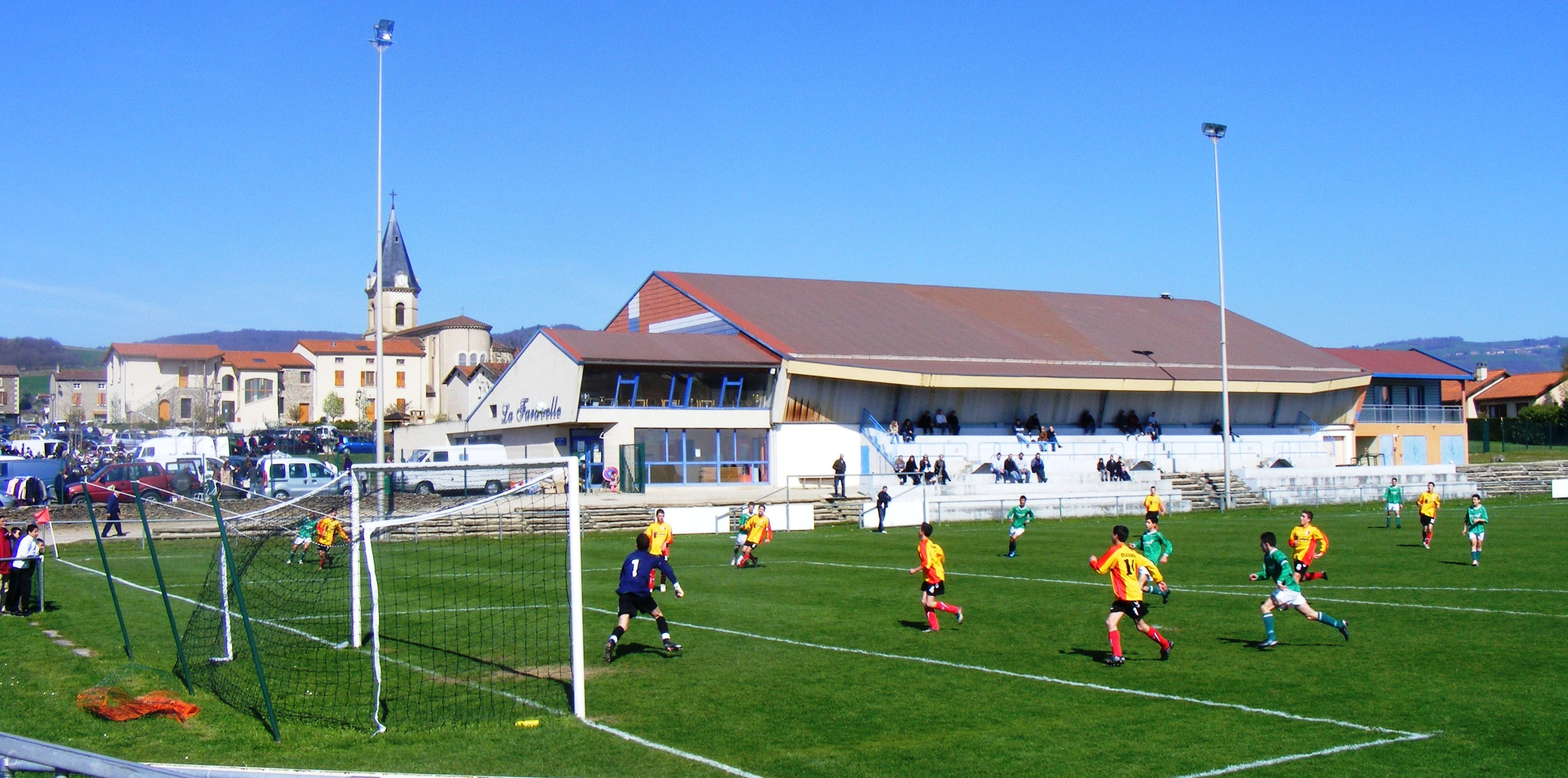 Le stade de football 42800 Saint-Joseph